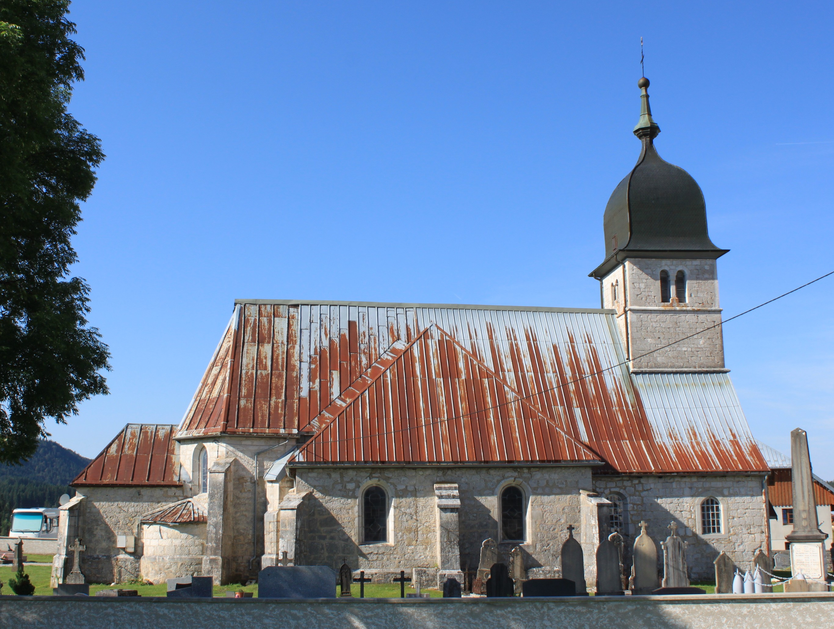 Église Saint-Jean-Baptiste de Chapelle-des-Bois, Doubs, Franche-Comté, France